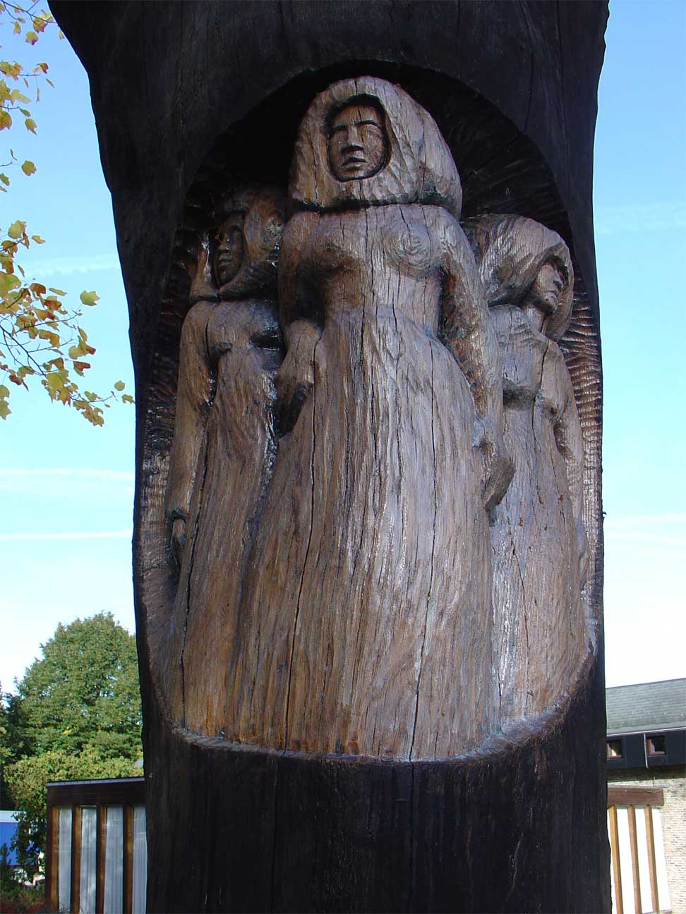 Witte Wieven door Piet Jaap Trotwood Freeve (geb. 1936) op de Brink in Norg